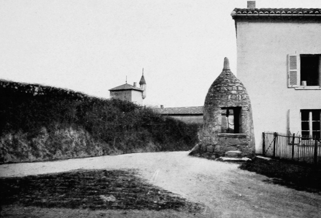 Dictionnaire illustré des communes du département du Rhône. Tome 2 / par MM. E. de Rolland et D. Clouzet.